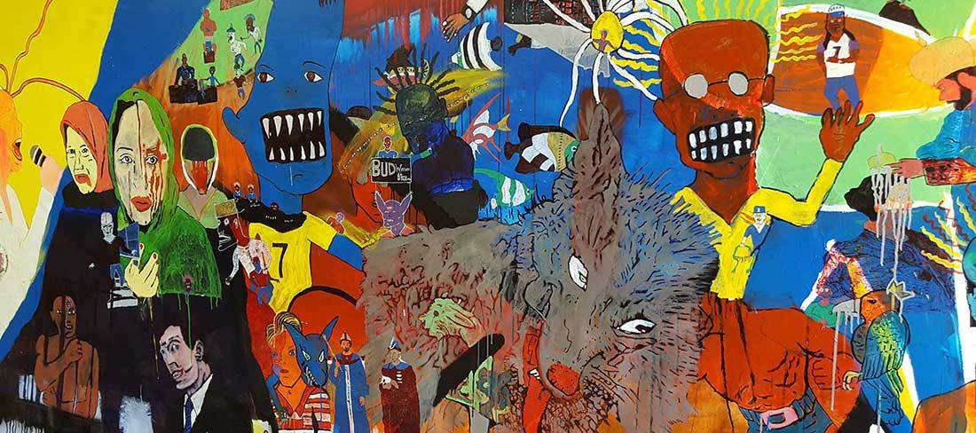 Af sýningunni "By Proxy" í Galerie NEXT, Vínarborg